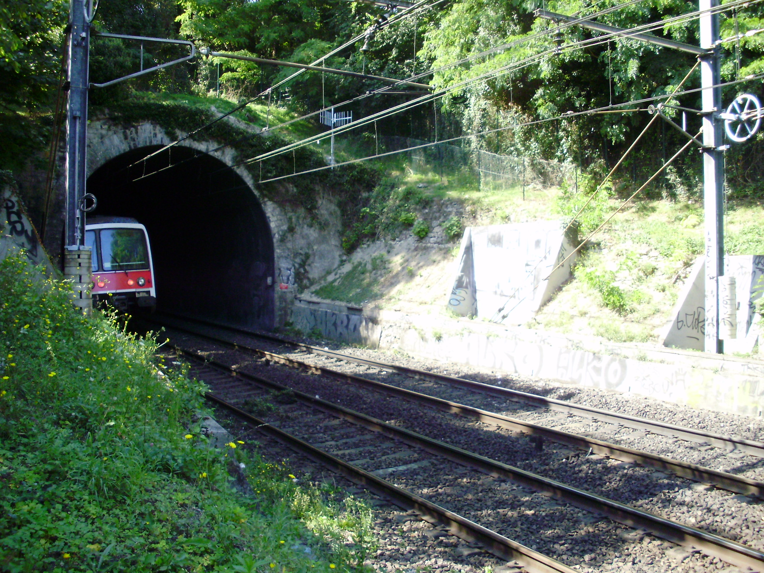 Entrée est du tunnel de Saint-Germain-en-Laye, sur la commune du Pecq, Yvelines, France, vue depuis un sentier prolongeant l'allée des Gas, au sud de la voie ferrée.